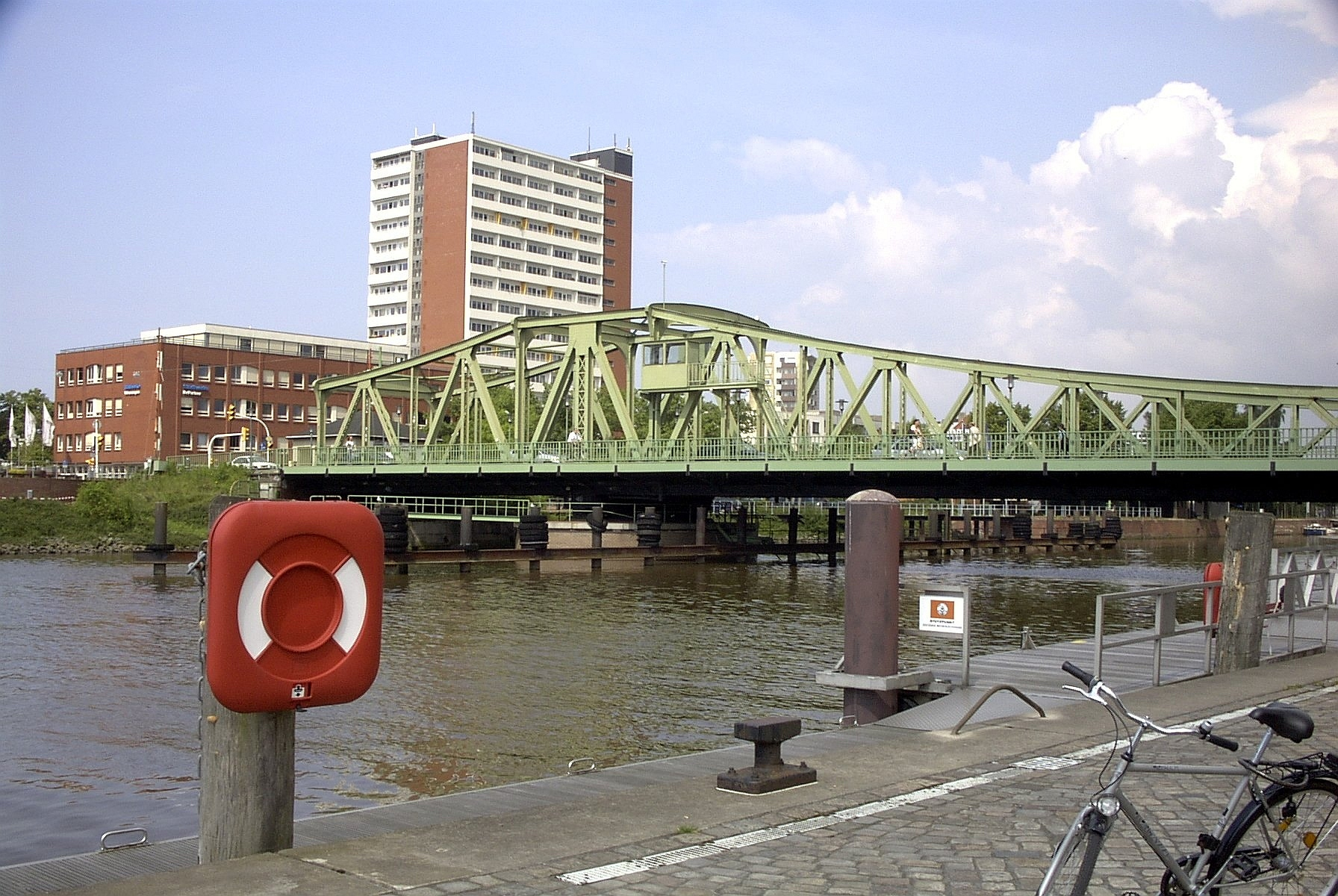 Alte Geestebrücke in Bremerhaven